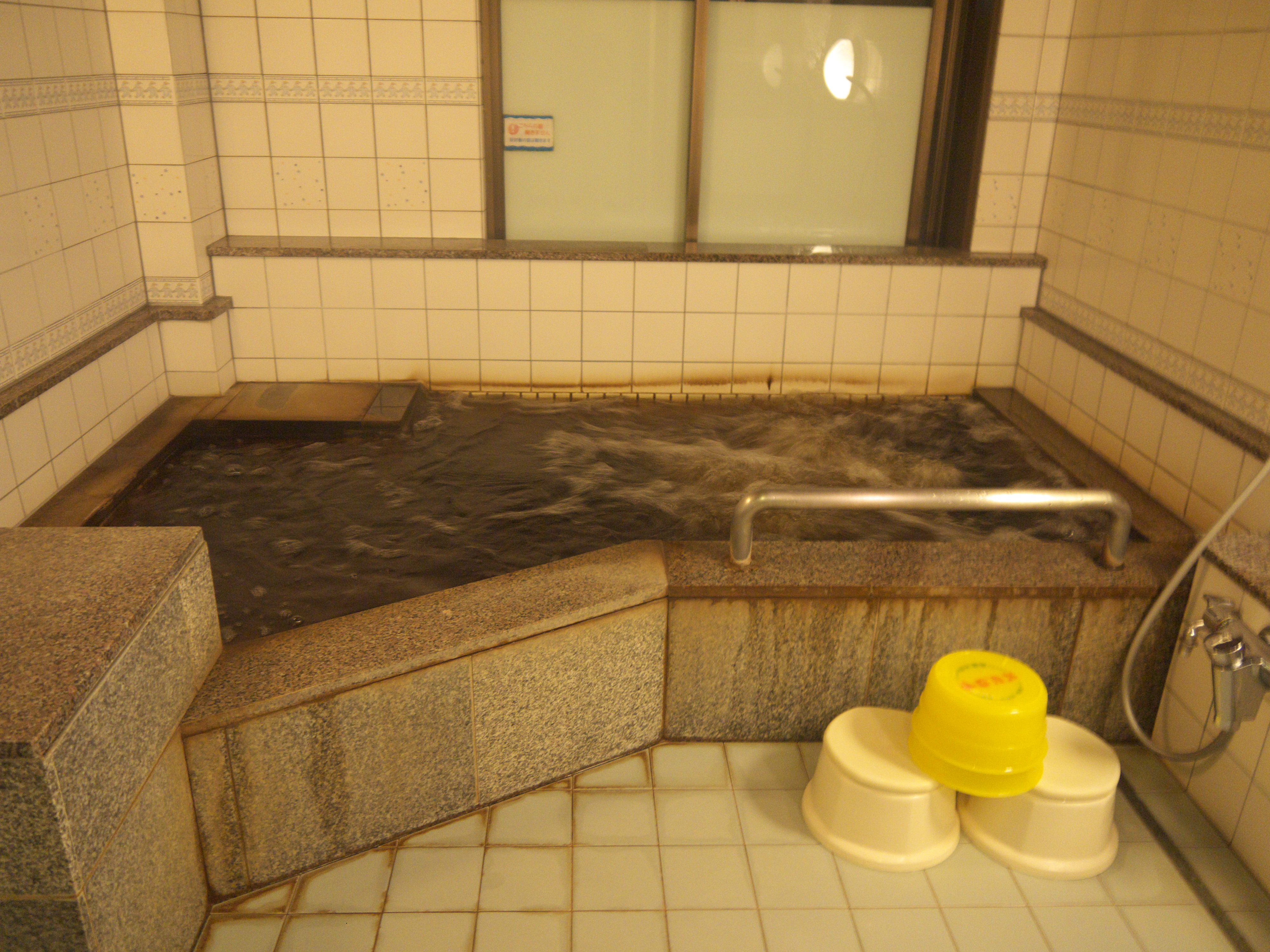 金城温泉家族風呂. モール泉、金城温泉家族風呂, 金城温泉